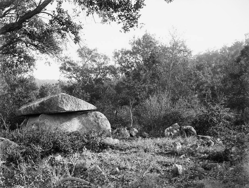 Imatge